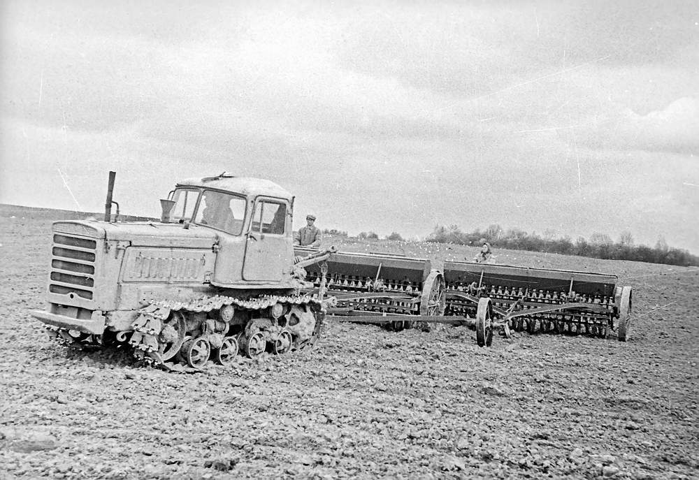 Работает посевной агрегат. Трактором ДТ-75 управляет механизатор Александр Васильевич Степанов, один из лучших механизаторов колхоза «Прогресс». В страдную пору посевных дней он дорожит каждой минутой. Большая Брембола, Переславский район. (Переславский музей-заповедник, отдел истории советского общества, конверт 1085. По газетному списку номер 37.)